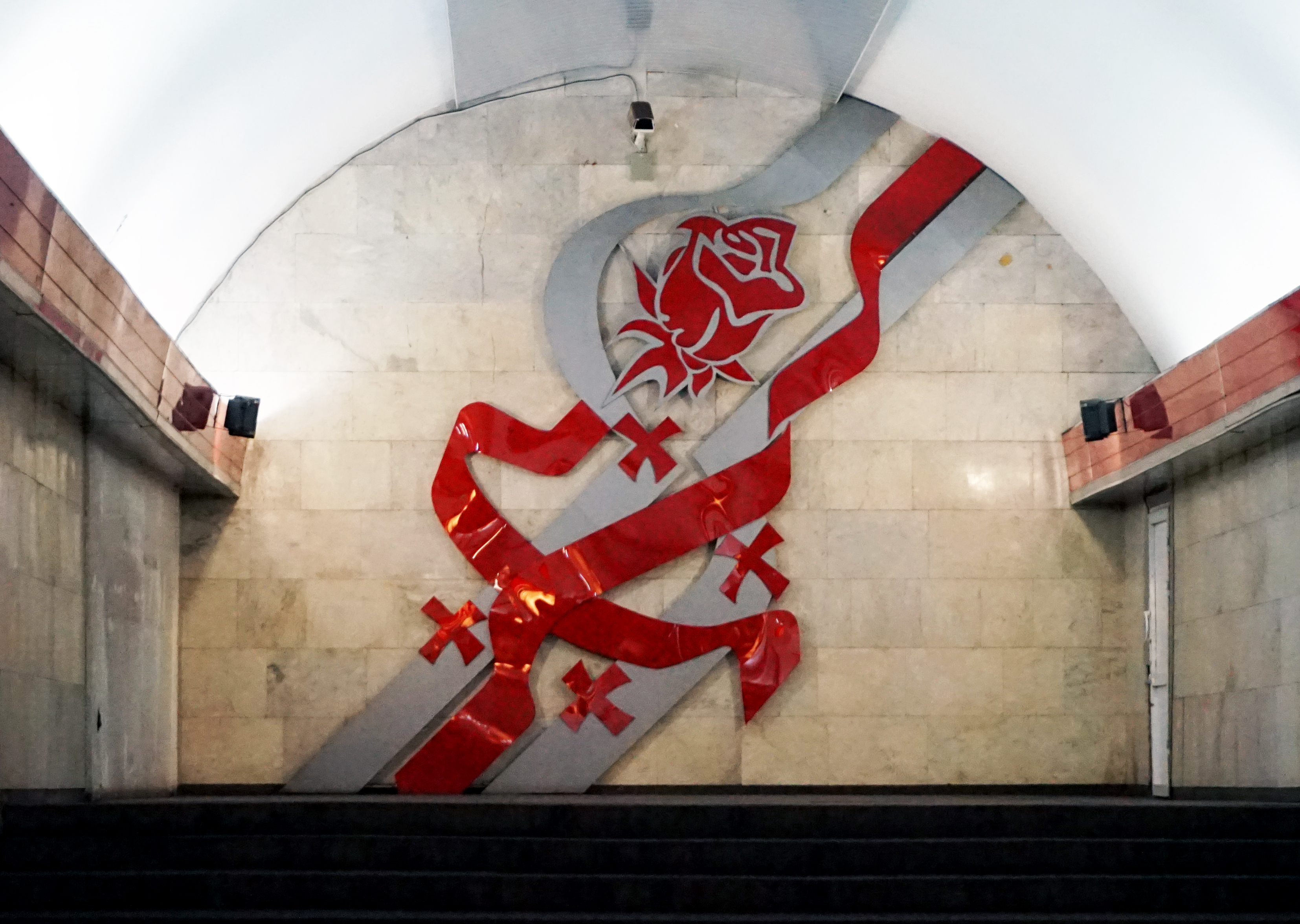 自由广场地铁站玫瑰革命纪念浮雕。